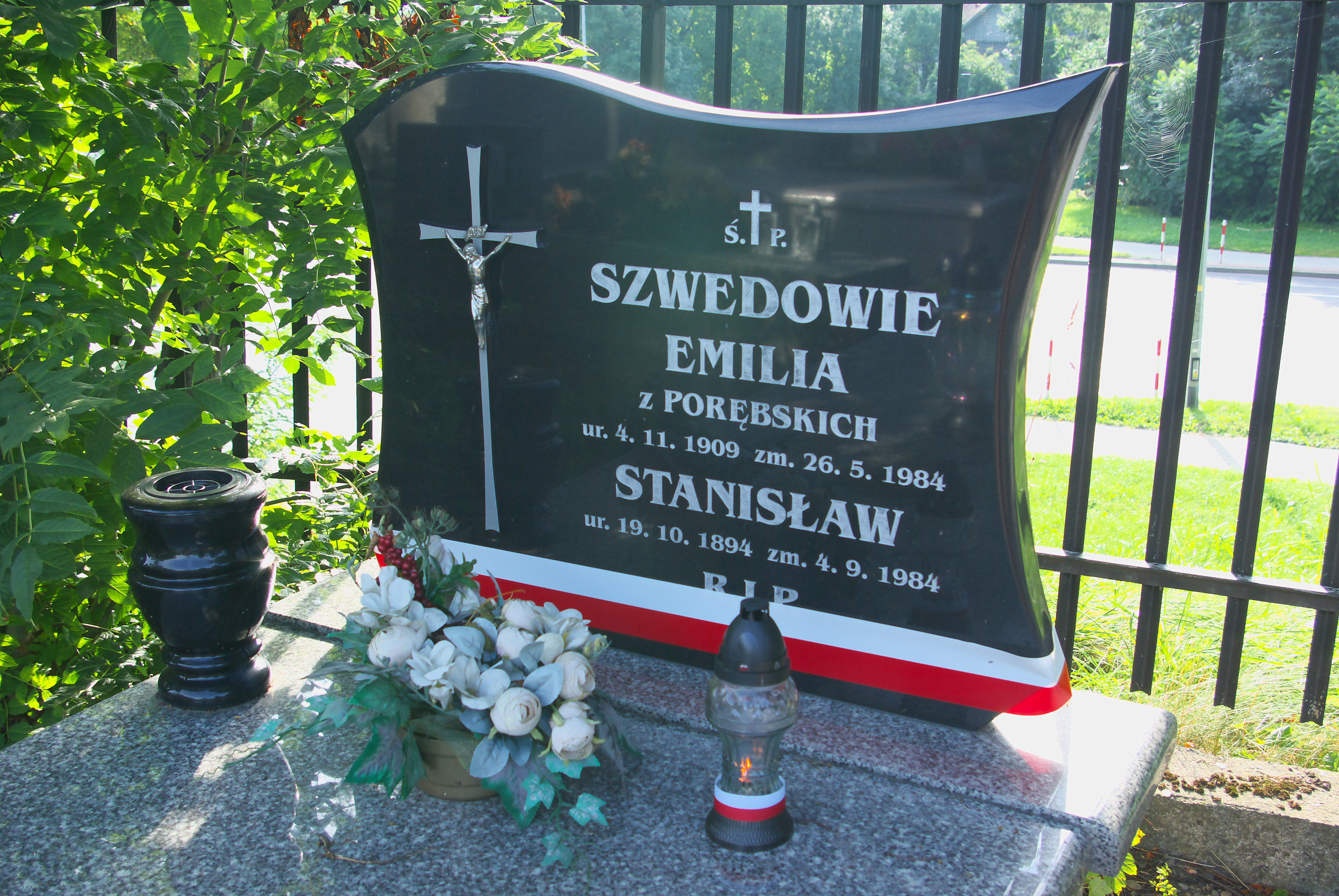 Uroczystości 100. rocznicy Bitwy Warszawskiej (1920-2020) w Sanoku. Grób uczestnika bitwy polsko-bolszewickiej, kpt. Stanisława Szweda, udekorowany barwami narodowymi.